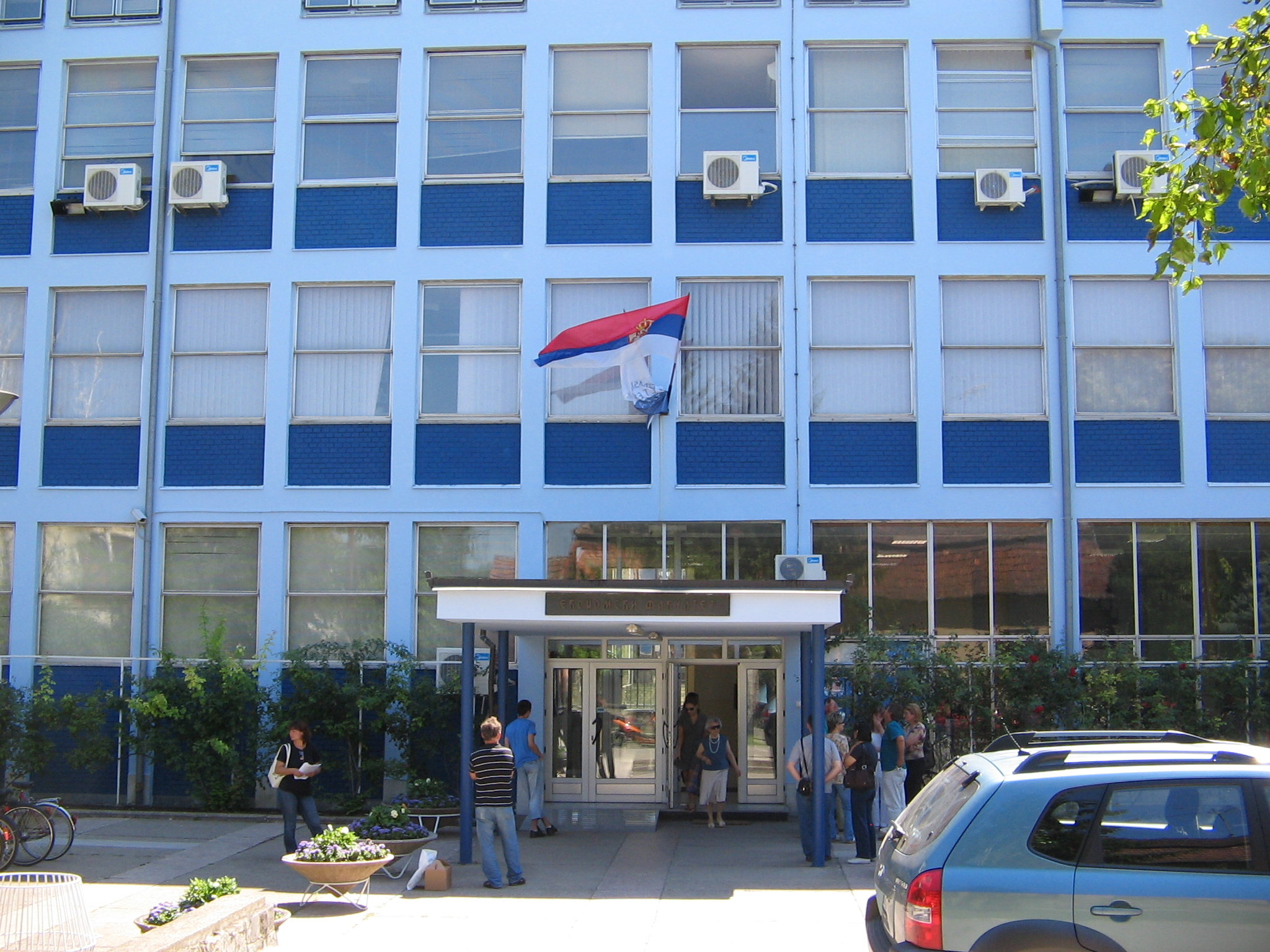 Ekonomski fakultet u Subotici